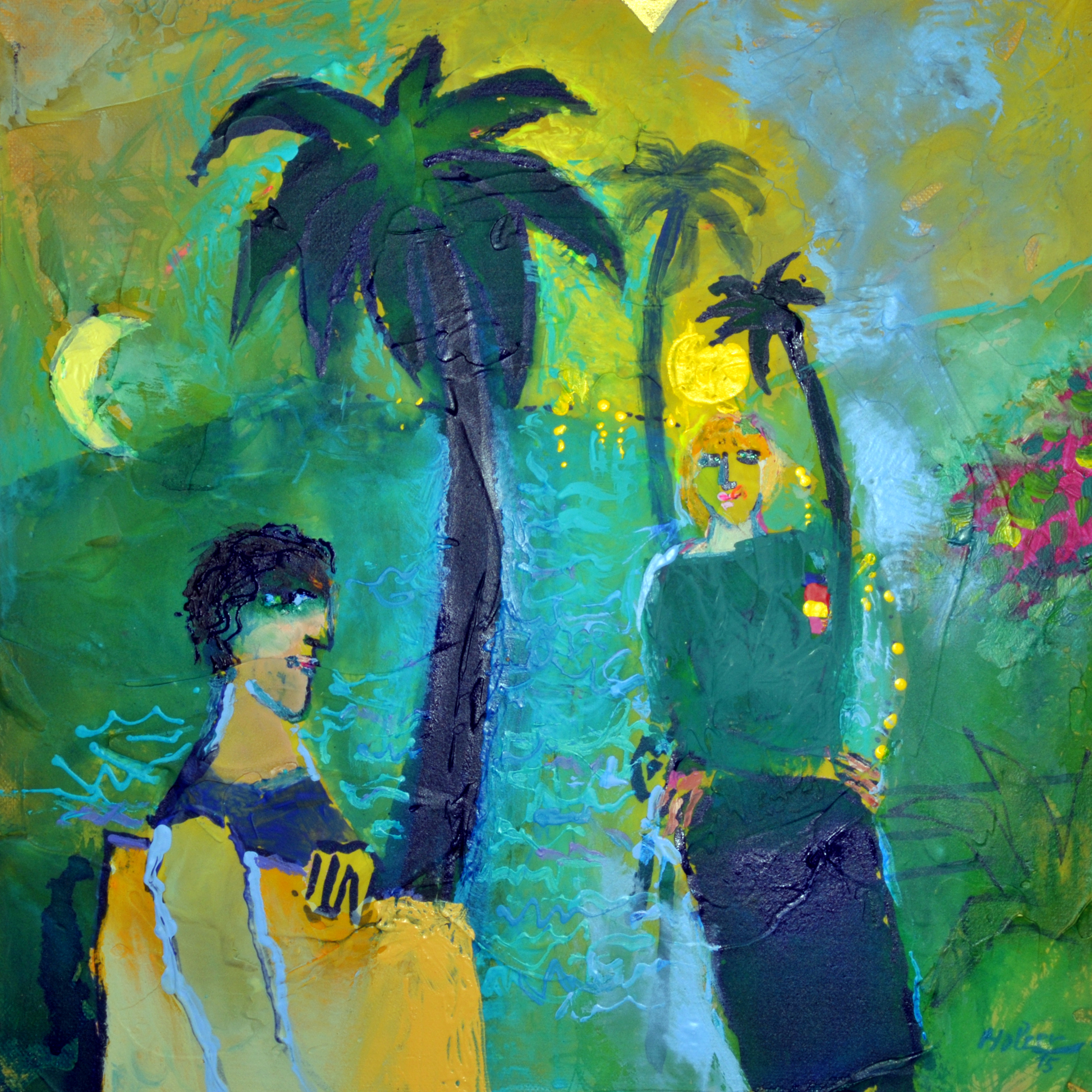 Bei der Maturareise lernte Adi Holzer 1955 in Nizza seine Frau, die dänische Medizinstudentin und spätere Kinderärztin Kirsten Inger Mygind, kennen, die von ihm nach ihren Initialen Kim genannt wird. Adi Holzer stammte aus Österreich und Kirsten Inger Mygind aus Dänemark. Sieben Jahre lang arbeiteten beide für ihr Studium und für ihren Berufsabschluss. Adi Holzer studierte in den Jahren 1955–1960 an der Akademie der bildenden Künste Wien bei den Professoren Robin Christian Andersen und Herbert Boeckl. Er schloss sein Studium 1960 mit dem Diplom für Malerei ab. Anschließend arbeitete er 1960–1962 in Kärnten als Kunsterzieher am Bundesrealgymnasium Klagenfurt am Völkermarkter Ring. In diesen beiden Jahren veröffentlichte er bereits seine ersten Kunstwerke. Kim nutzte die sieben Jahre für ihr Medizinstudium und für den Beginn der medizinischen Laufbahn als Kinderärztin. 1962 heirateten beide in Dänemark. Nach den Flitterwochen im südlichen Österreich übersiedelte Adi Holzer zur gemeinsamen Wohnung in Hareskovby im Nordwesten von Kopenhagen. Adi Holzer widmete sich nun ganz seiner künstlerischen Laufbahn. Entstehung von "Begegnung in Nizza" im Jahr 2015. Die Fotografie entstand am 8. Mai 2016.